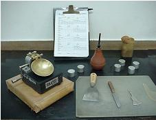 Aparelho de Casa Grande